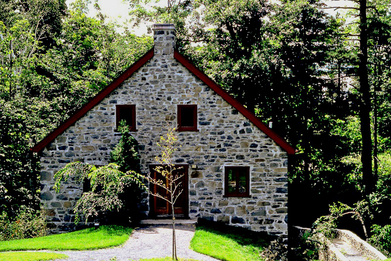 Facade du moulin à eau restauré situé sur le mont Saint-Bruno, que la population locale appelle le "Vieux-Moulin".